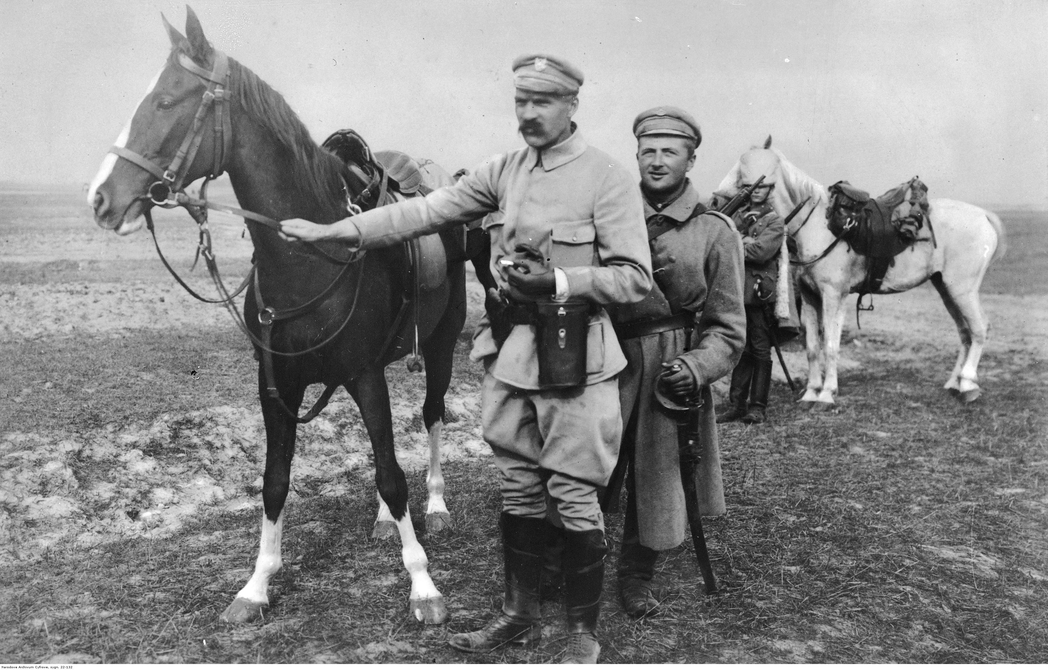 Józef Piłsudski z Kasztaną u boku. Obok brygadiera stoi ordynans Szymkiewicz z Małgoszcza.